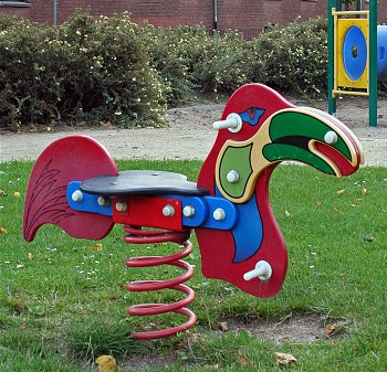 Een wipkip, of een veerstoel in de wijk Hemelrijken in Eindhoven, Oud Woensel.